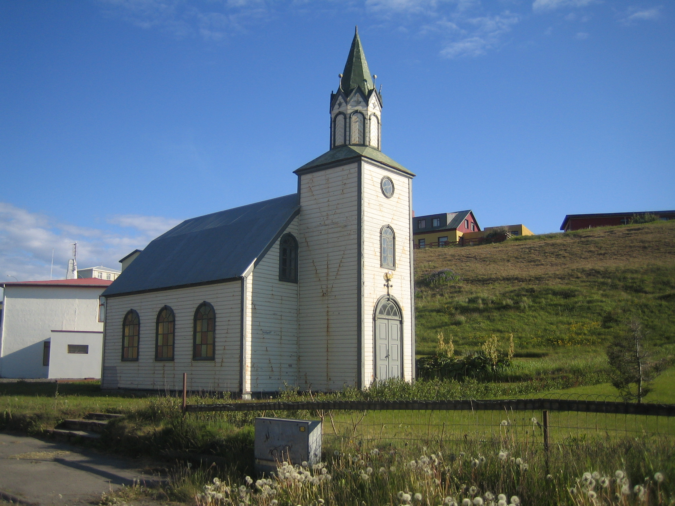 Gamla kirkjan á Blönduósi